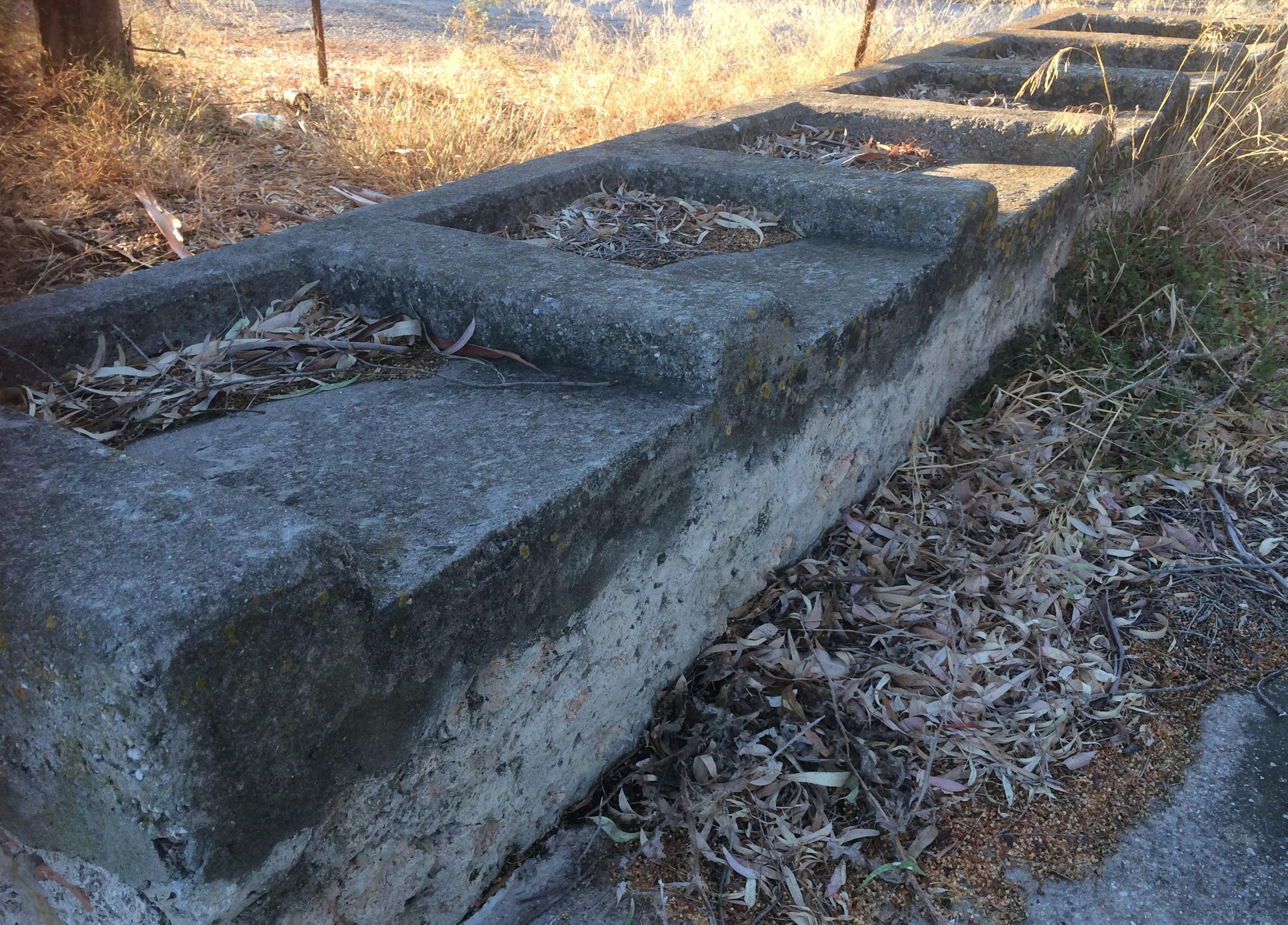 Κοινόχρηστο Πλυσταριό (όψη 2), Αστέρι Λακωνίας